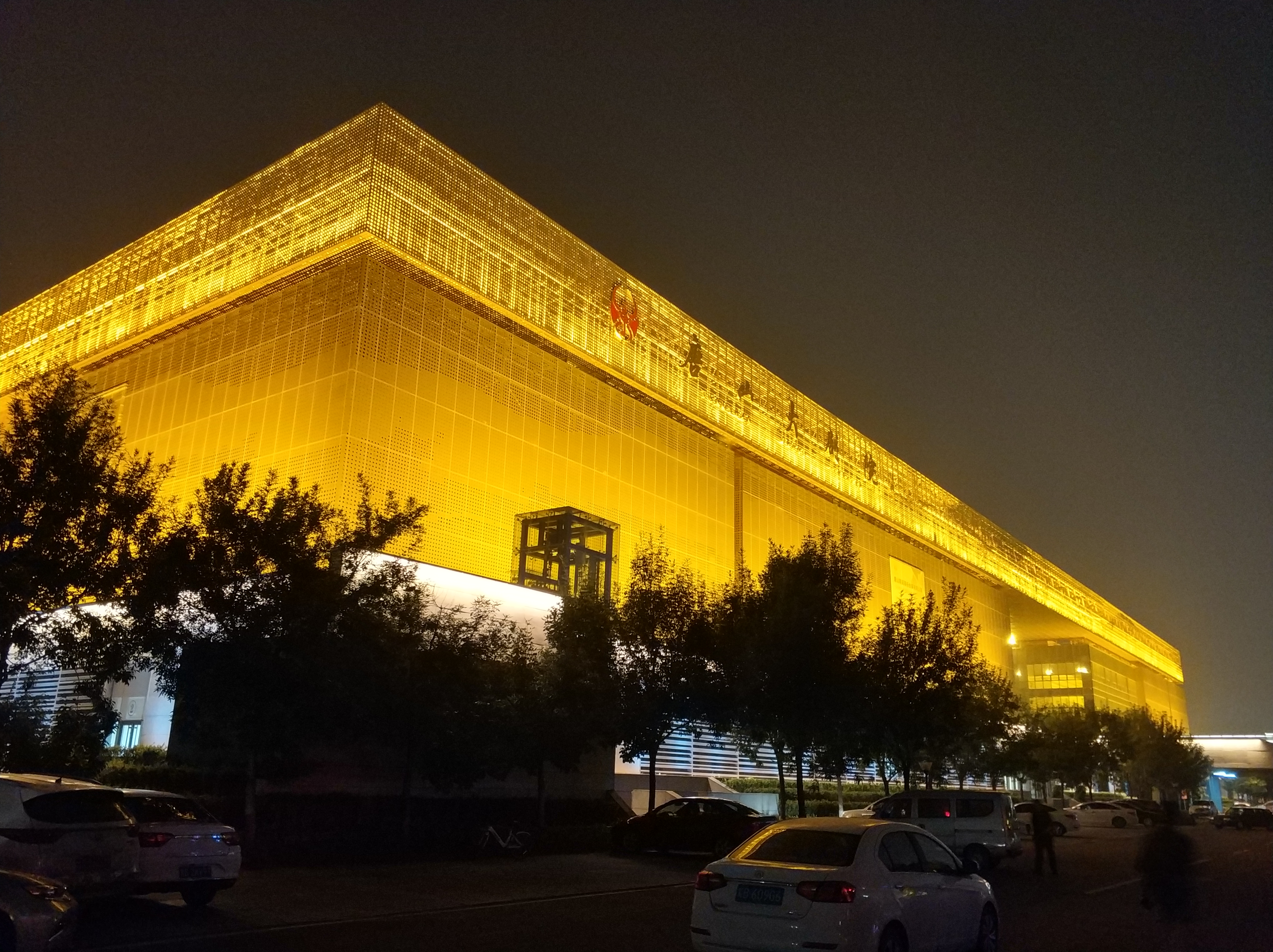 中文（中国大陆）: 位于唐山文化广场